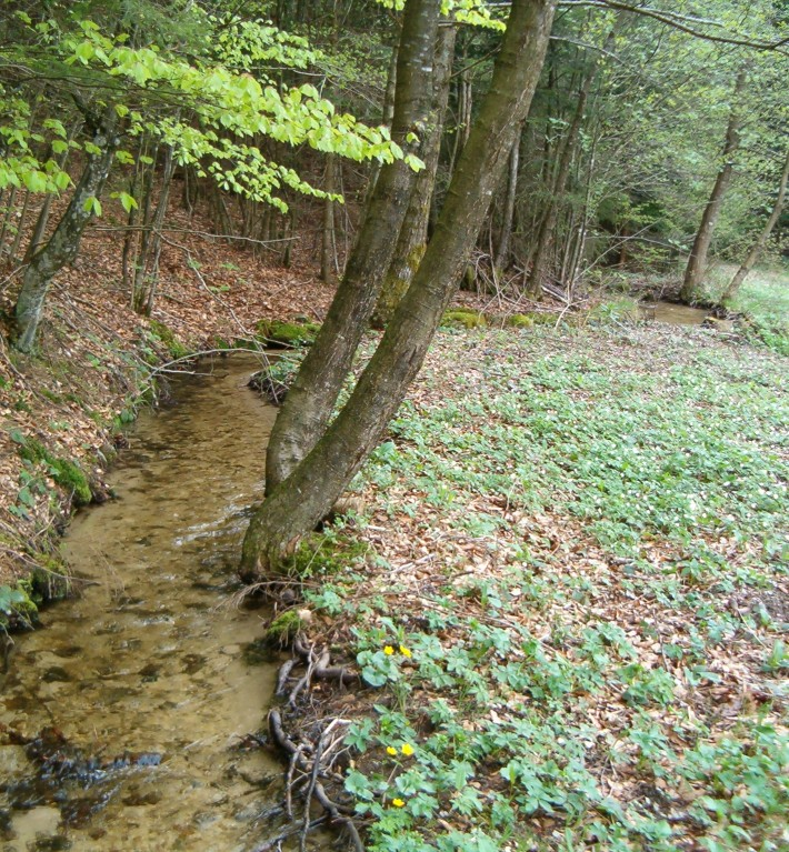 Das Seltenwuhr, etwa auf halber Strecke seines Verlaufs, gut 0,5 km vor der Mündung in das Hochsaler Wuhr am Ortsrand von Oberwihl, Gemeinde Görwihl.